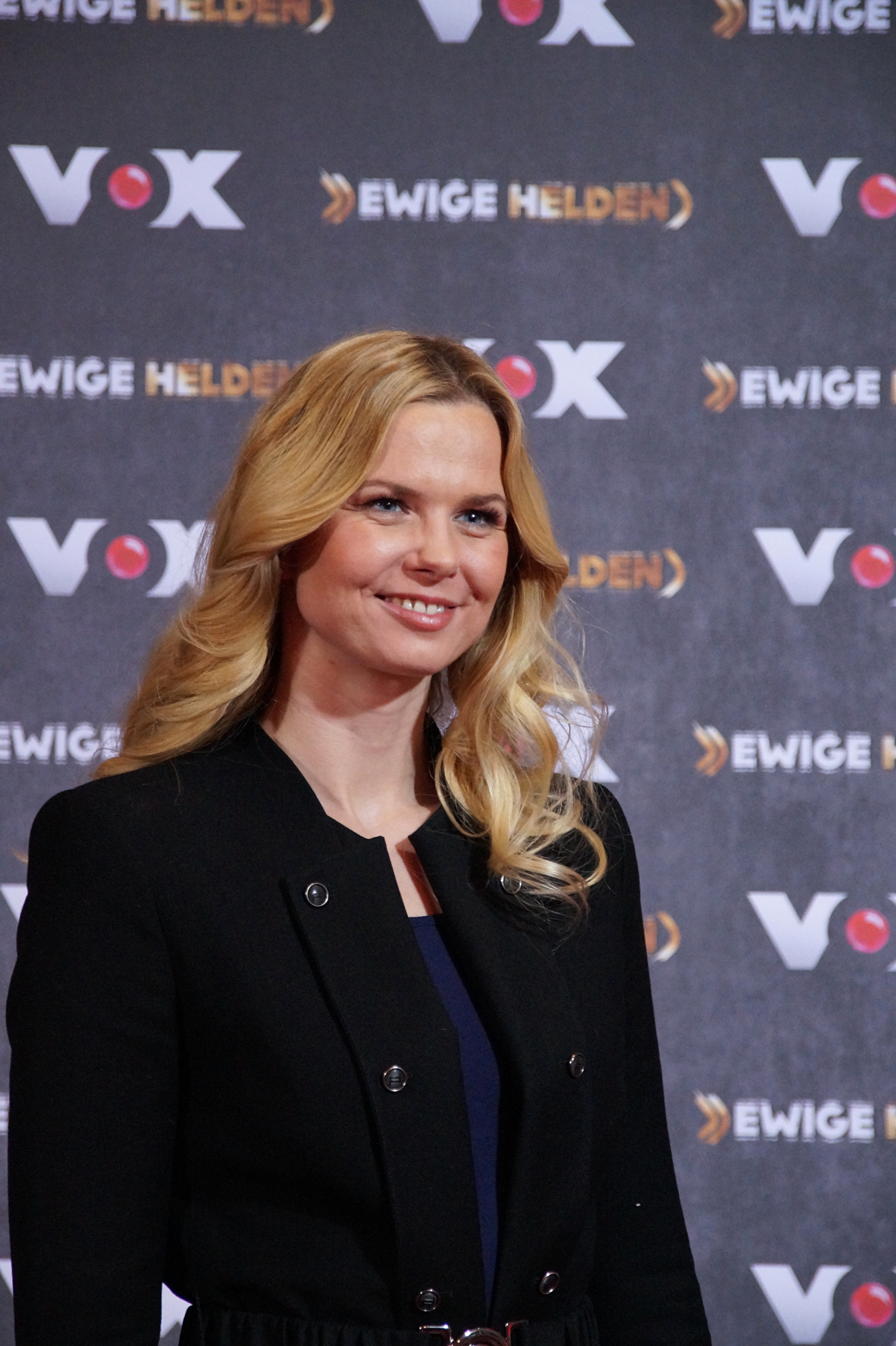 Britta Steffen beim VOX "Ewige Helden" Pressetermin, im Dezember 2015.